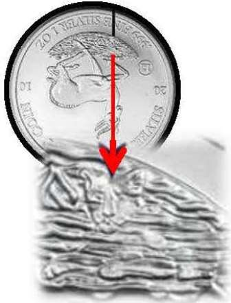 Malawi Silberunze 2010 Springbock; in der Savannenlandschaft verstecktes Tiermotiv - liegender Löwe